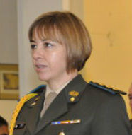 Maria Isabel Panza. Generala del Ejército Argentino.